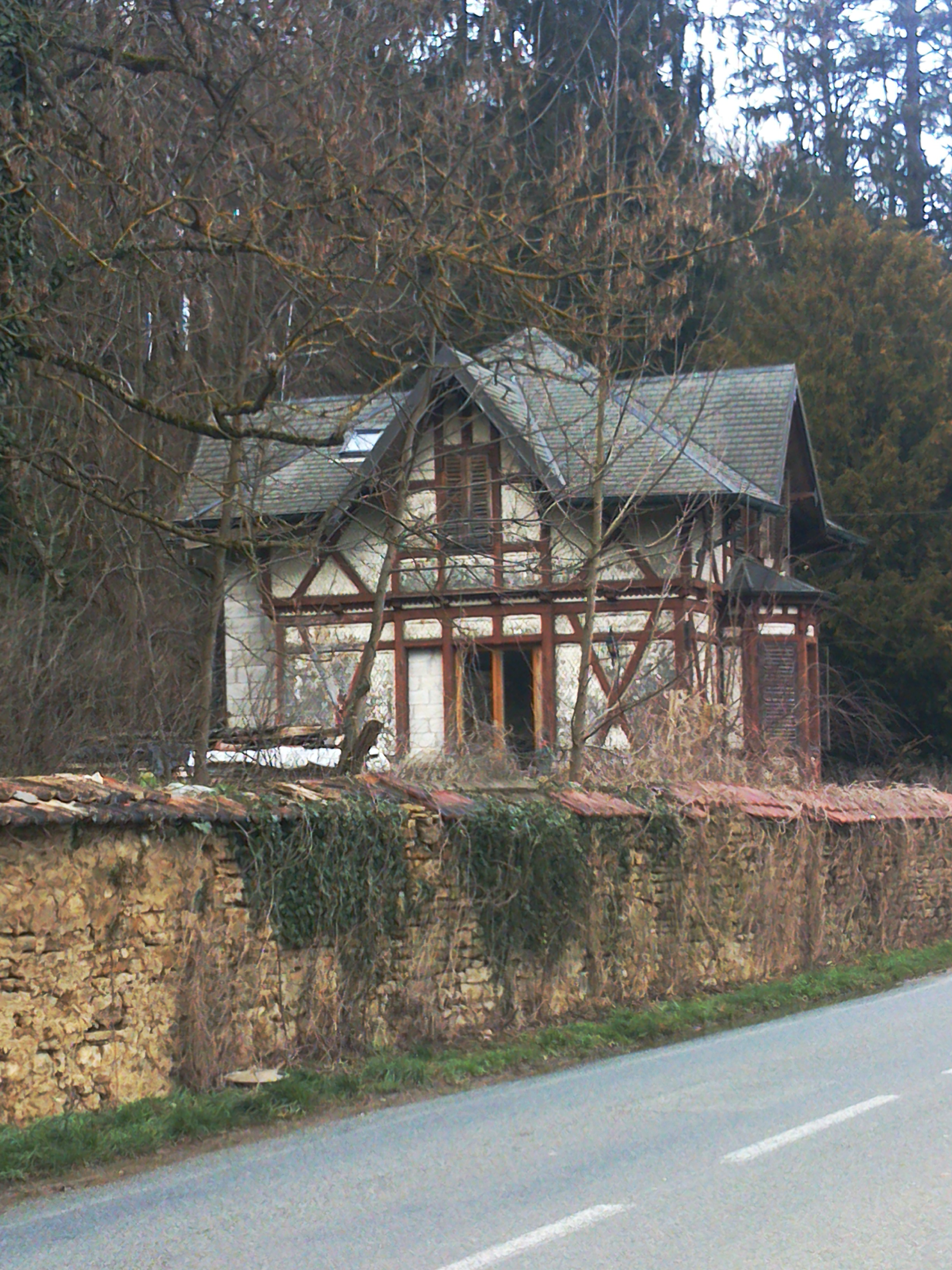 Chalet Meiner (maison du garde), Appenans, Doubs